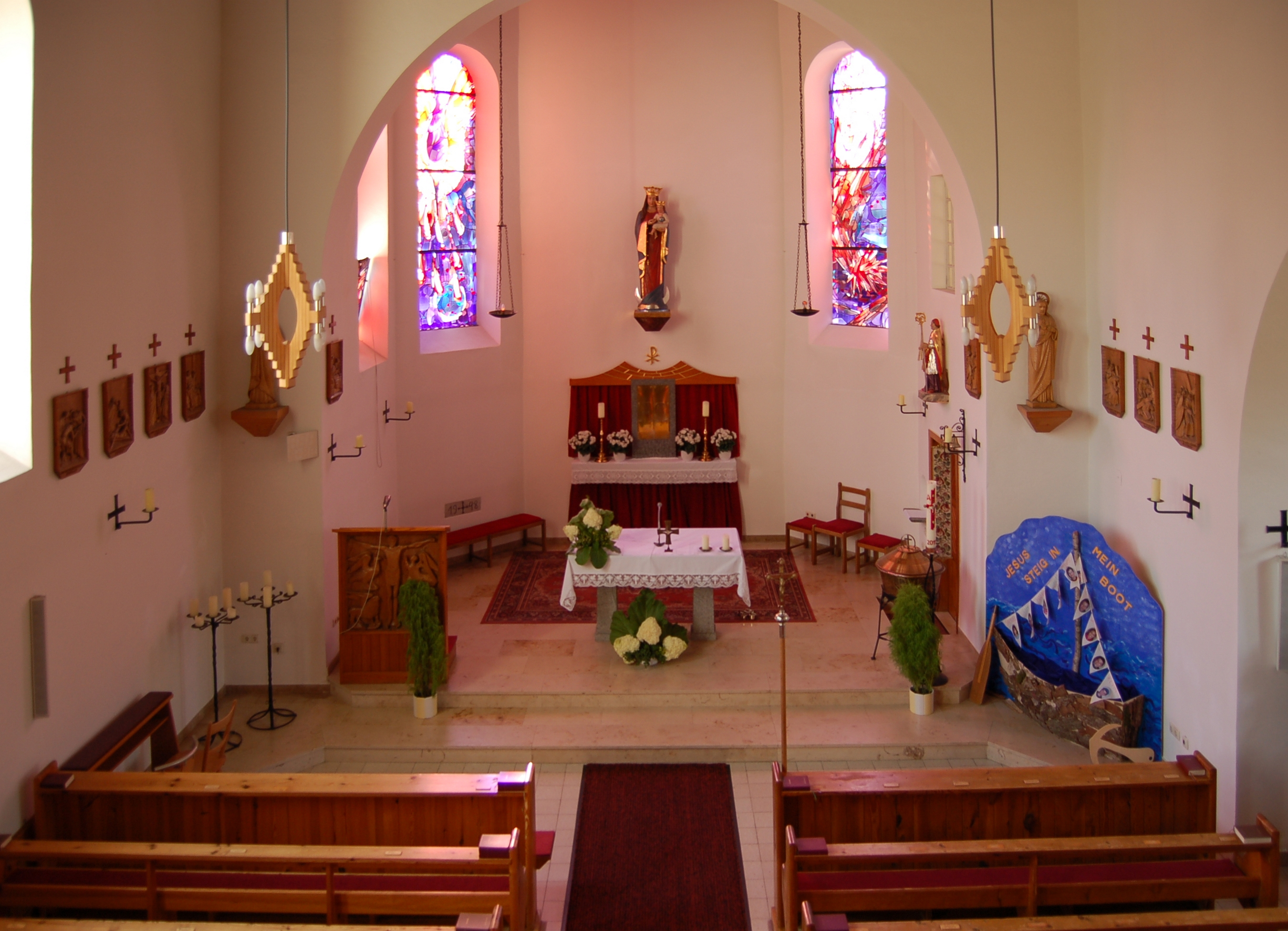 Die Kirche Maria Empfängnis in Neustift im Mühlkreis im Bezirk Rohrbach (Oberösterreich). Die Expositurkirche in Neustift wurde zwischen 1948 und 1950 an der Stelle einer 1869 errichteten Kapelle gebaut. Es handelt sich bei dem Neubau um einen schlichten, historisierenden Saalbau mit polygonalem Chor, Walmdach und markantem Turm. Die Einrichtung stammt großteils aus der Zeit um 1950.